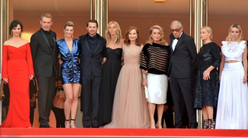 Juliette Binoche, Lambert Wilson, Céline Sallette, Pierre Deladonchamps, Sandrine Kiberlain, Isabelle Huppert, Catherine Deneuve, André Téchiné, Emmanuelle Beart et Élodie Bouchez au festival de Cannes